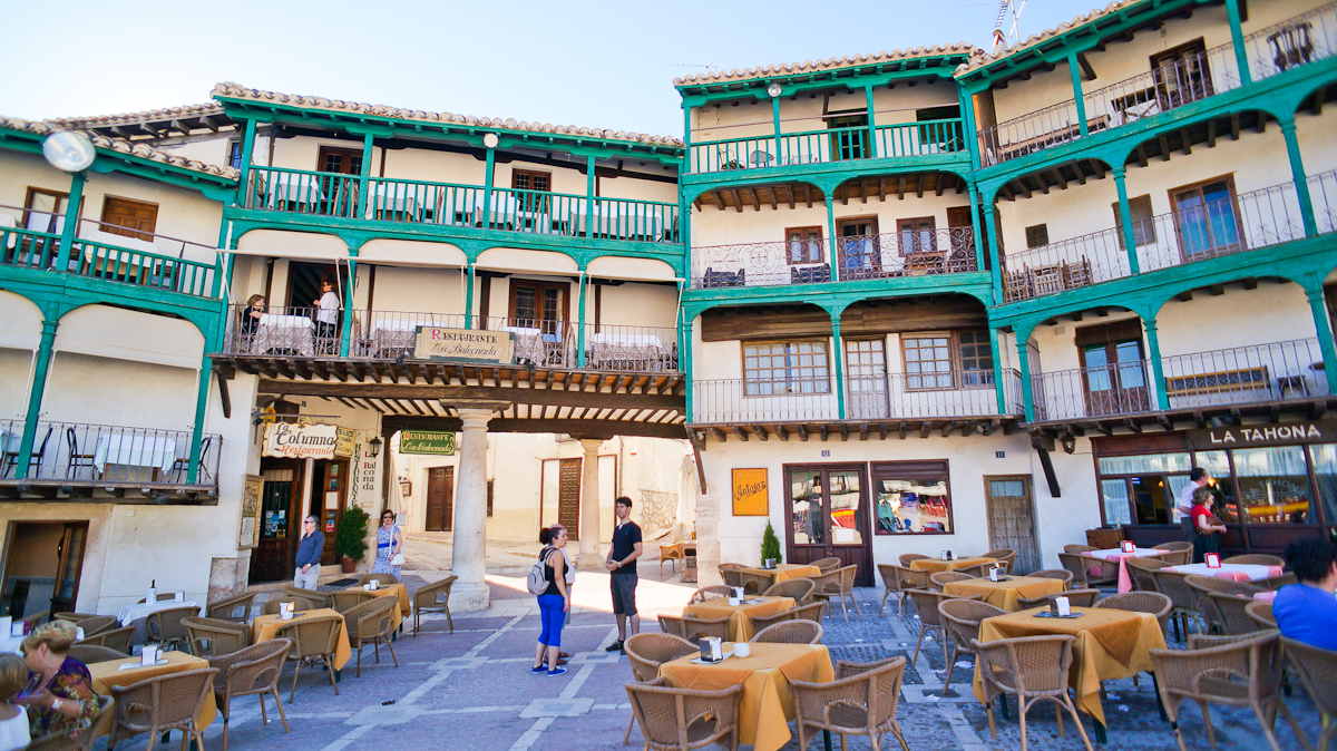 Un Día en Chinchón Puedes ver la entrada completa en